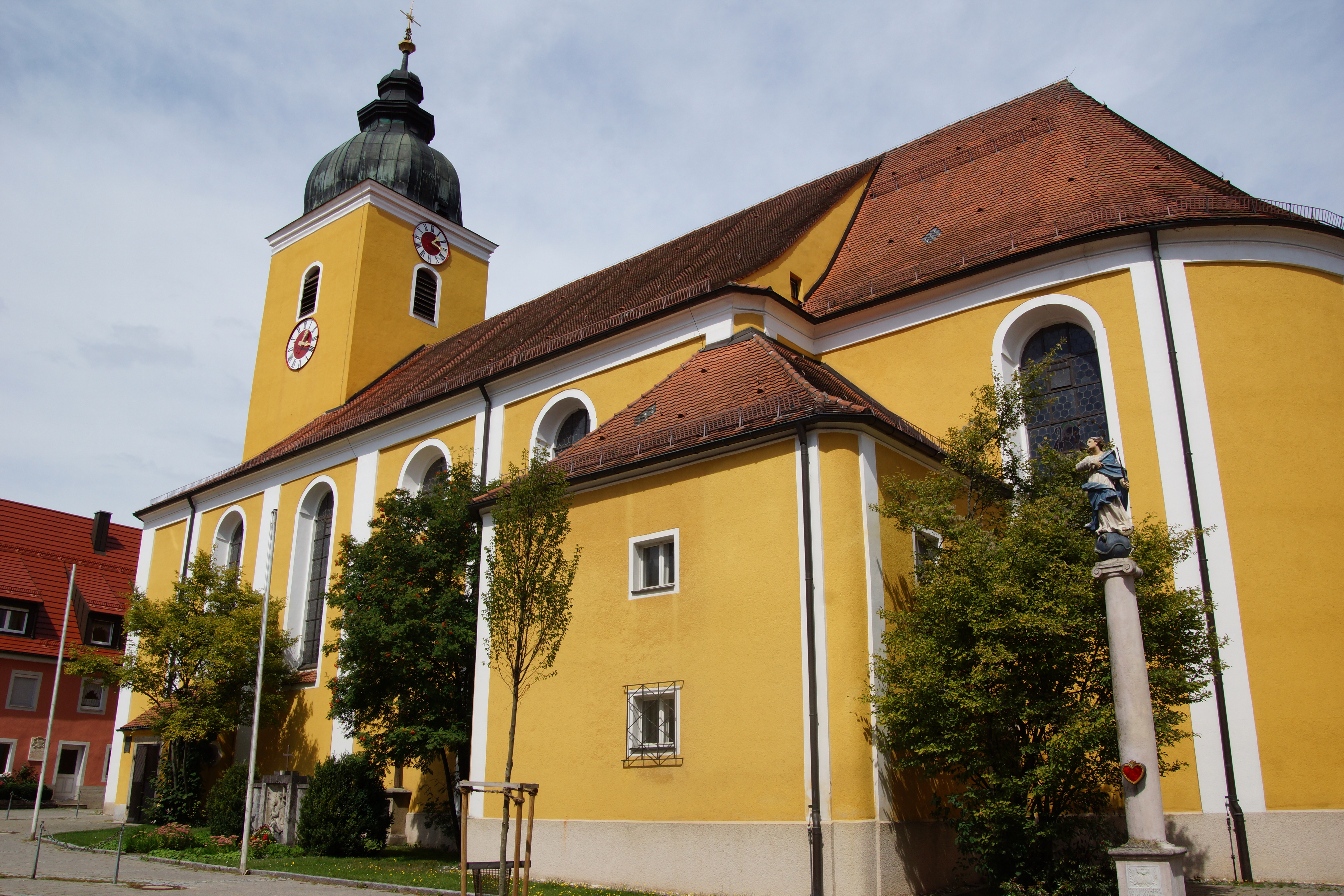 Die katholische Pfarrkirche St. Peter und Paul in Beratzhausen